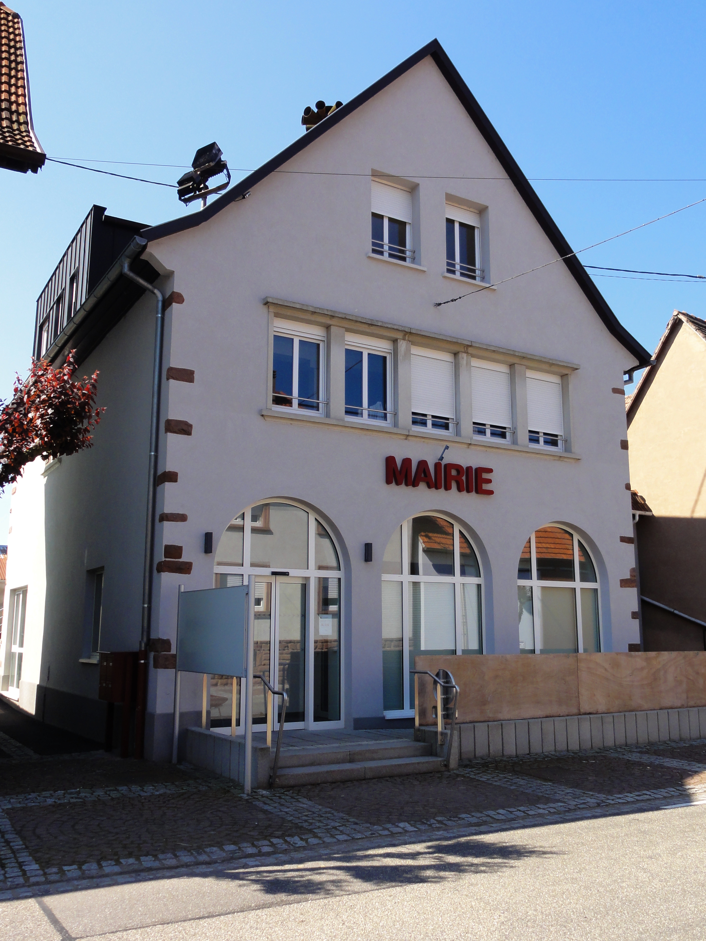 Alsace, Bas-Rhin, Kindwiller, Mairie, rue Principale.